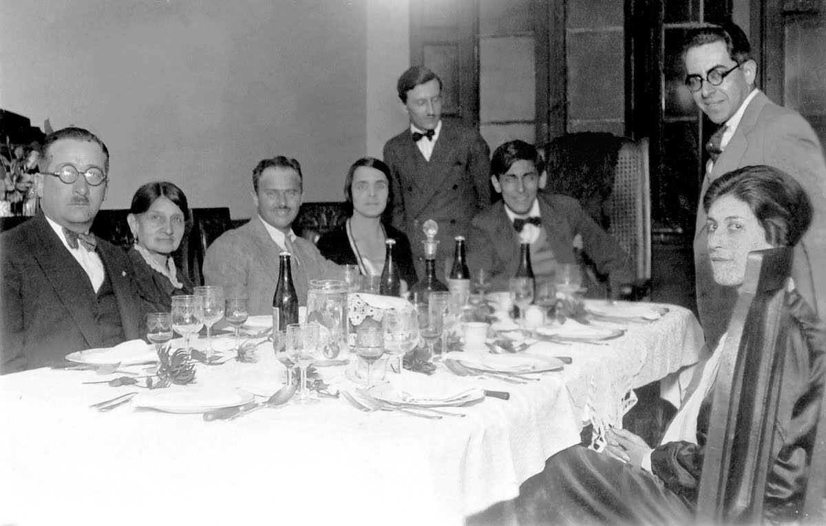 Hugo Pesce (parado) con José Carlos Mariátegui (derecha).